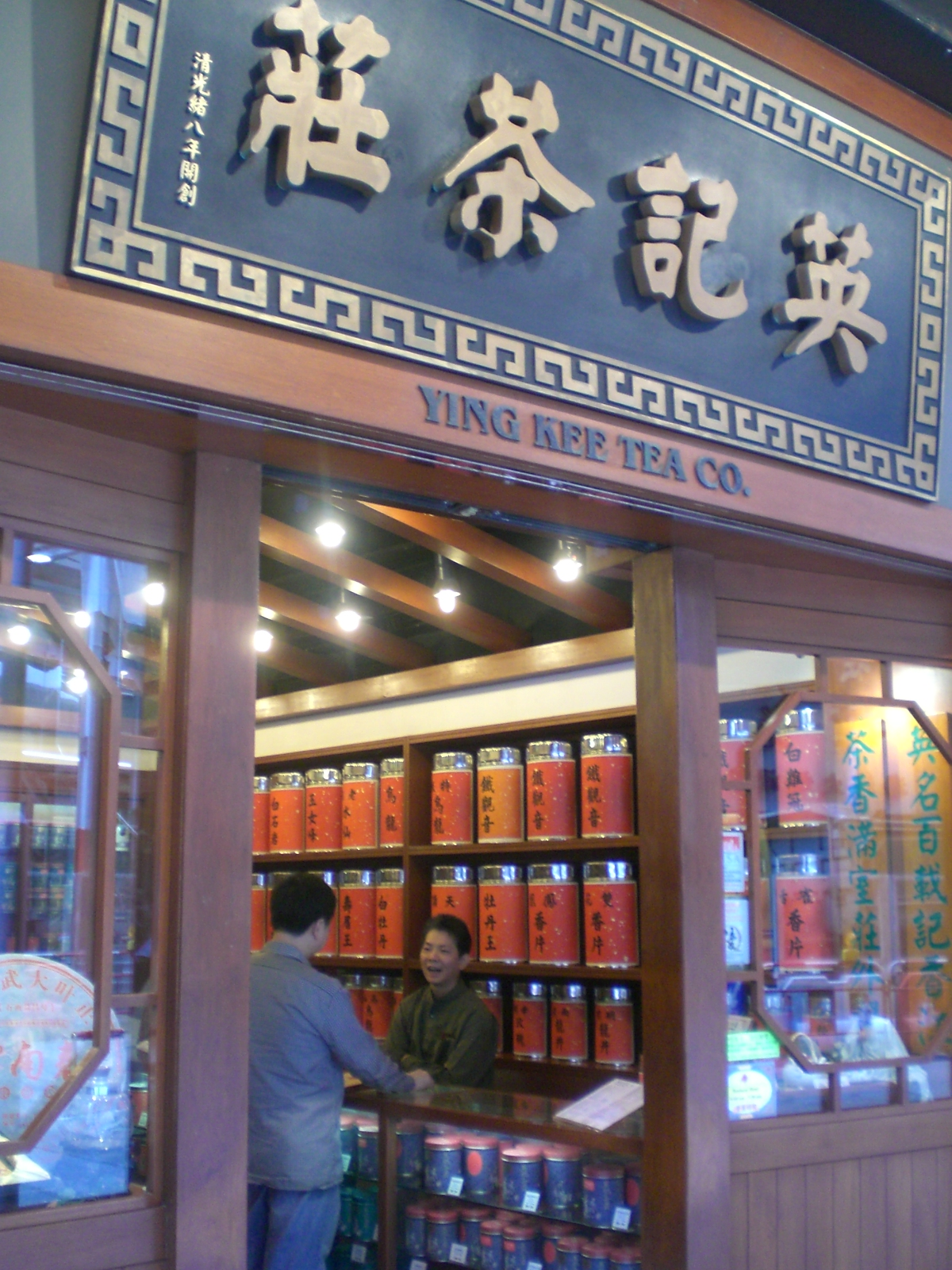 英記茶莊是zh:香港著名的老牌商號之一。 在zh:1881年，清朝zh:光緒八年於zh:廣州由陳朝英創立，zh:1950年代遷店至香港，家族生意至今已經守業至第四代。 Photo author is me, User:Kwanyatsw